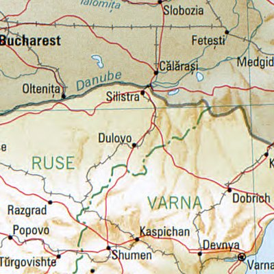 Silistra - Lage des Ortes in Bulgarien